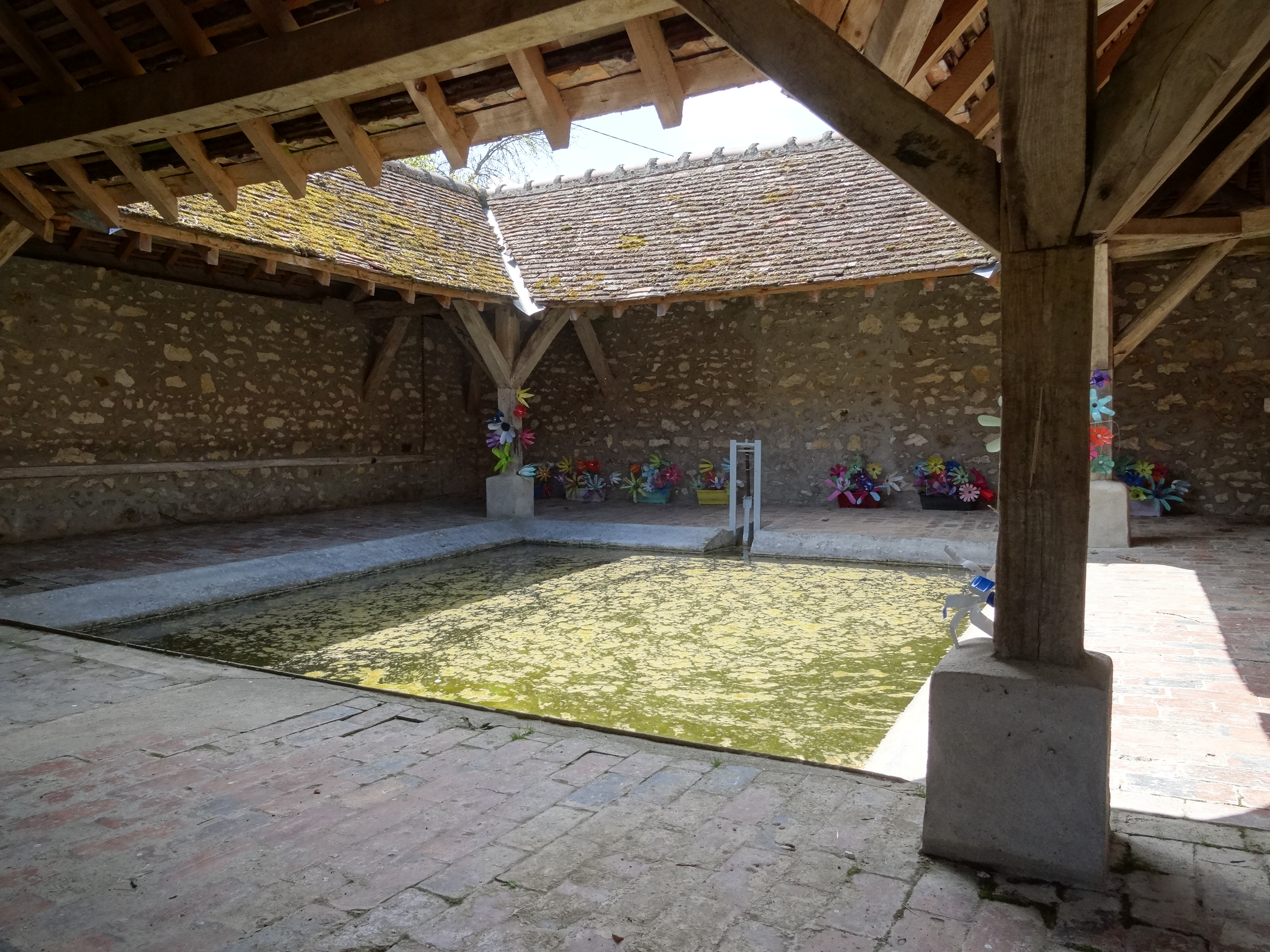 Lavoir de Fontenailles. (Seine-et-Marne, région Île-de-France).